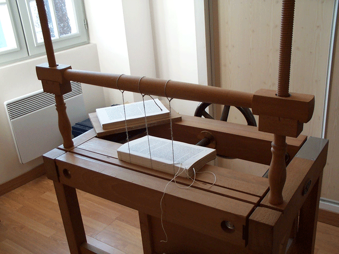 Cousoir moderne servant à coudre les cahiers, une des étapes de la reliure.